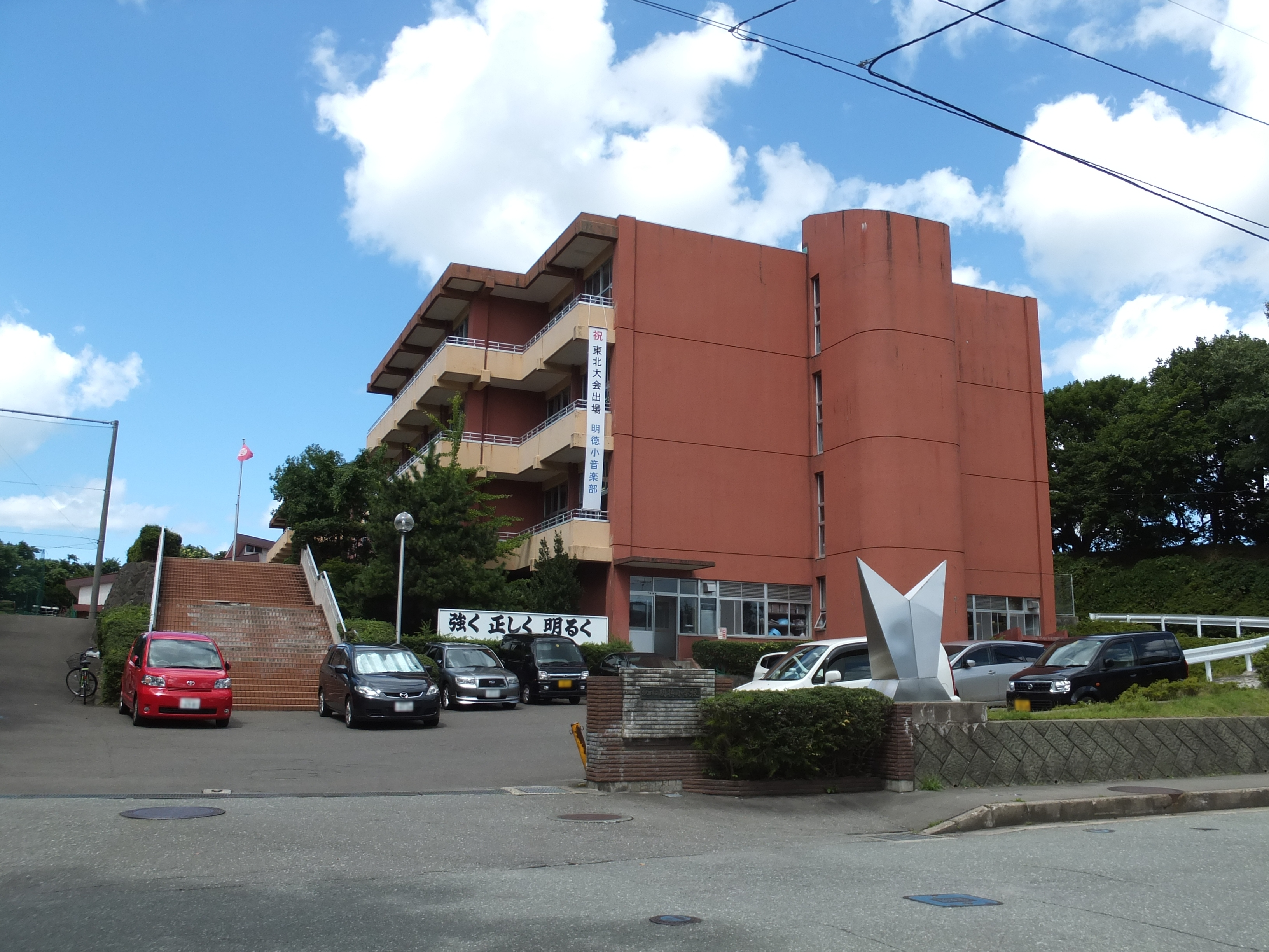 秋田市立明徳小学校